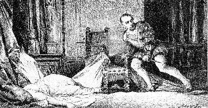 don Julio Caesar vraždí svoji milenku Markétu Pichlerovou